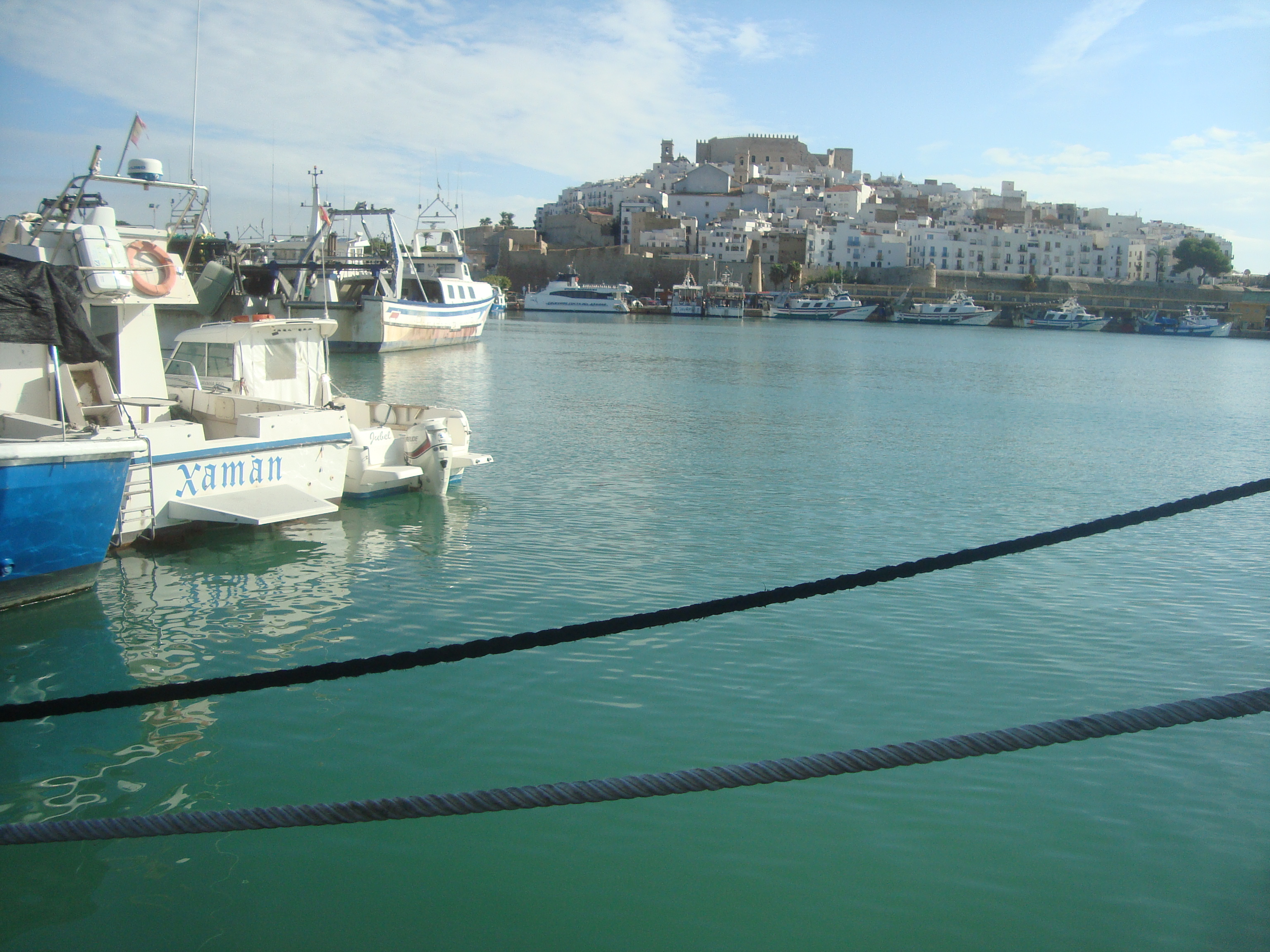 Port pesquer de Peníscola